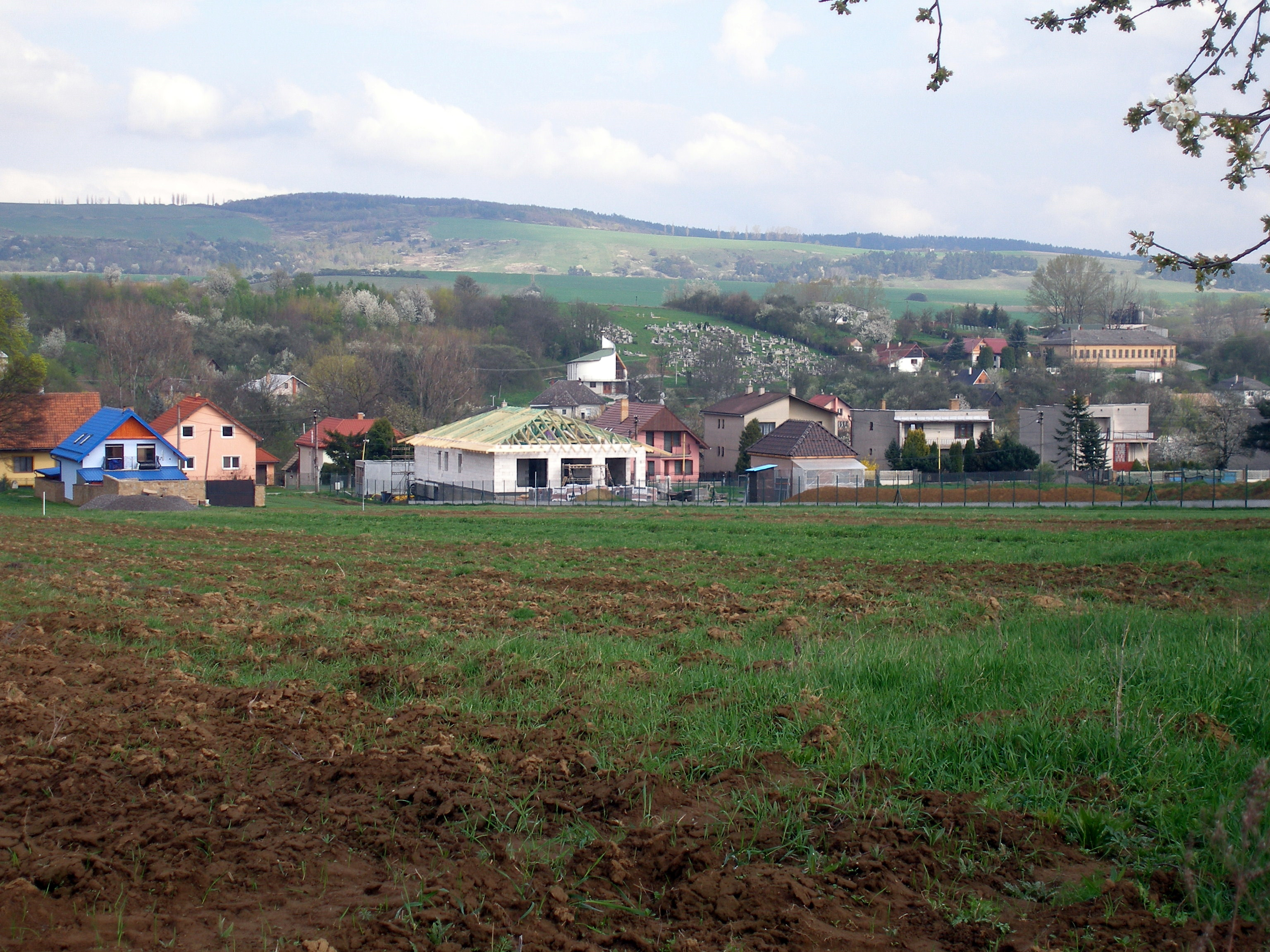 Obec Šarišské Bohdanovce okres Prešov región Šariš